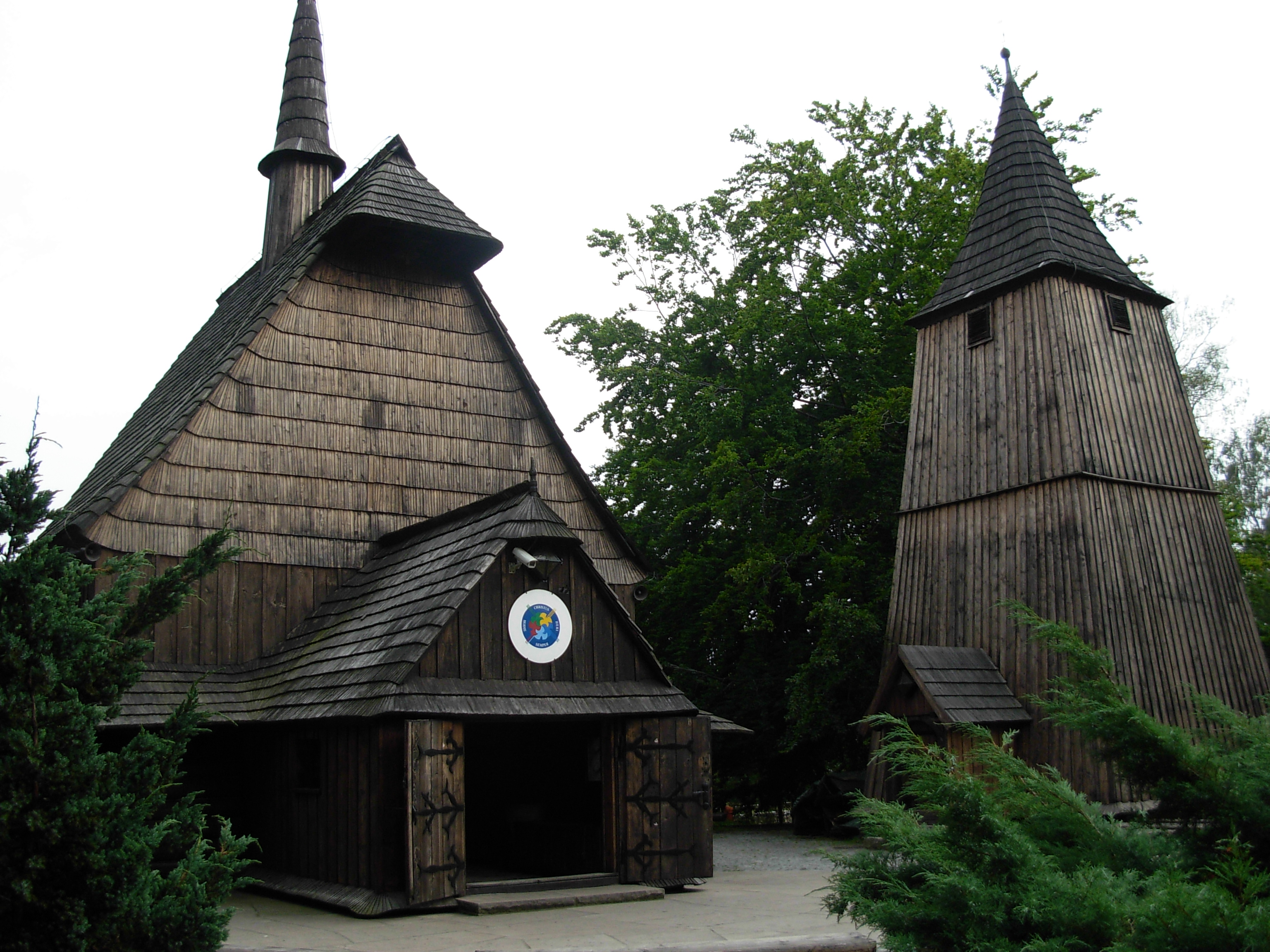 Katowice